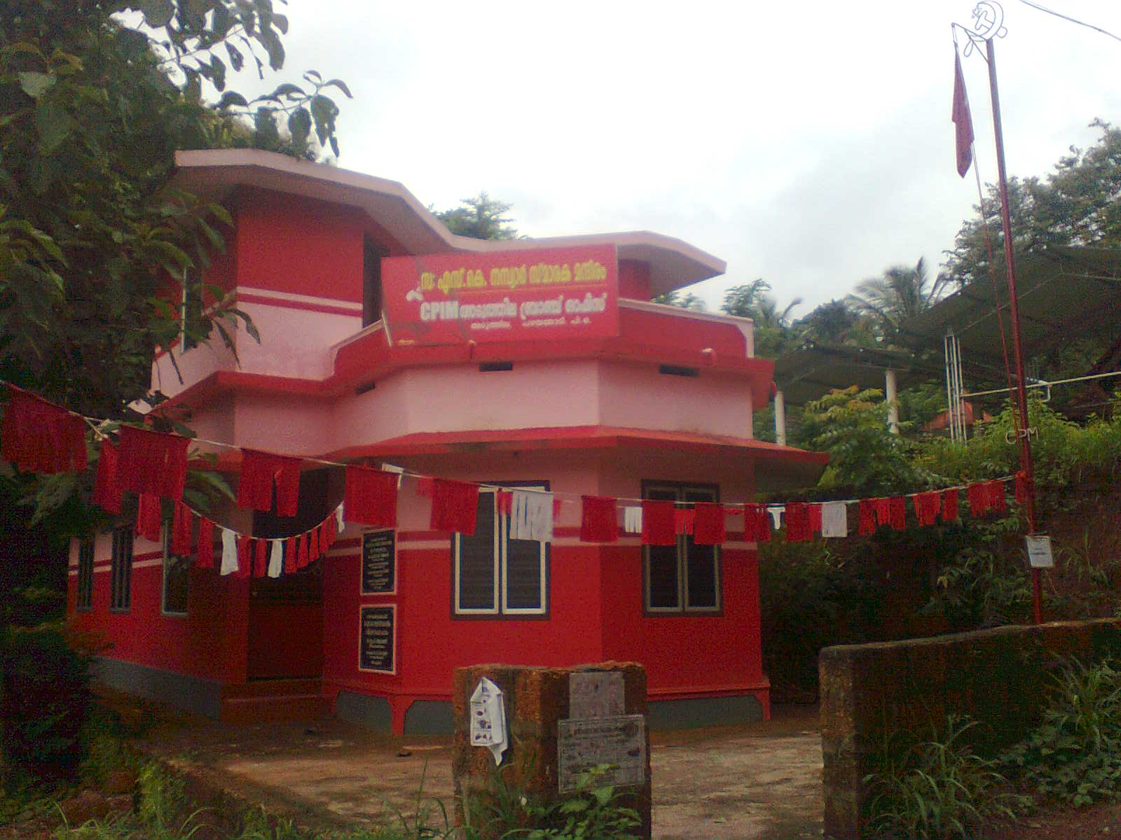 എസ് കെ നമ്പ്യാര്‍ സ്മാരകം, അടുത്തില